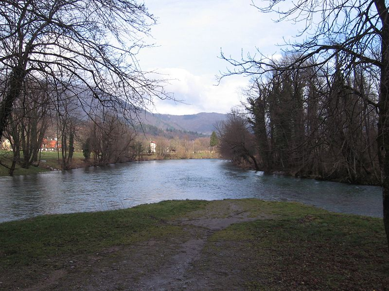 vlasništvo suradnika Zeljko